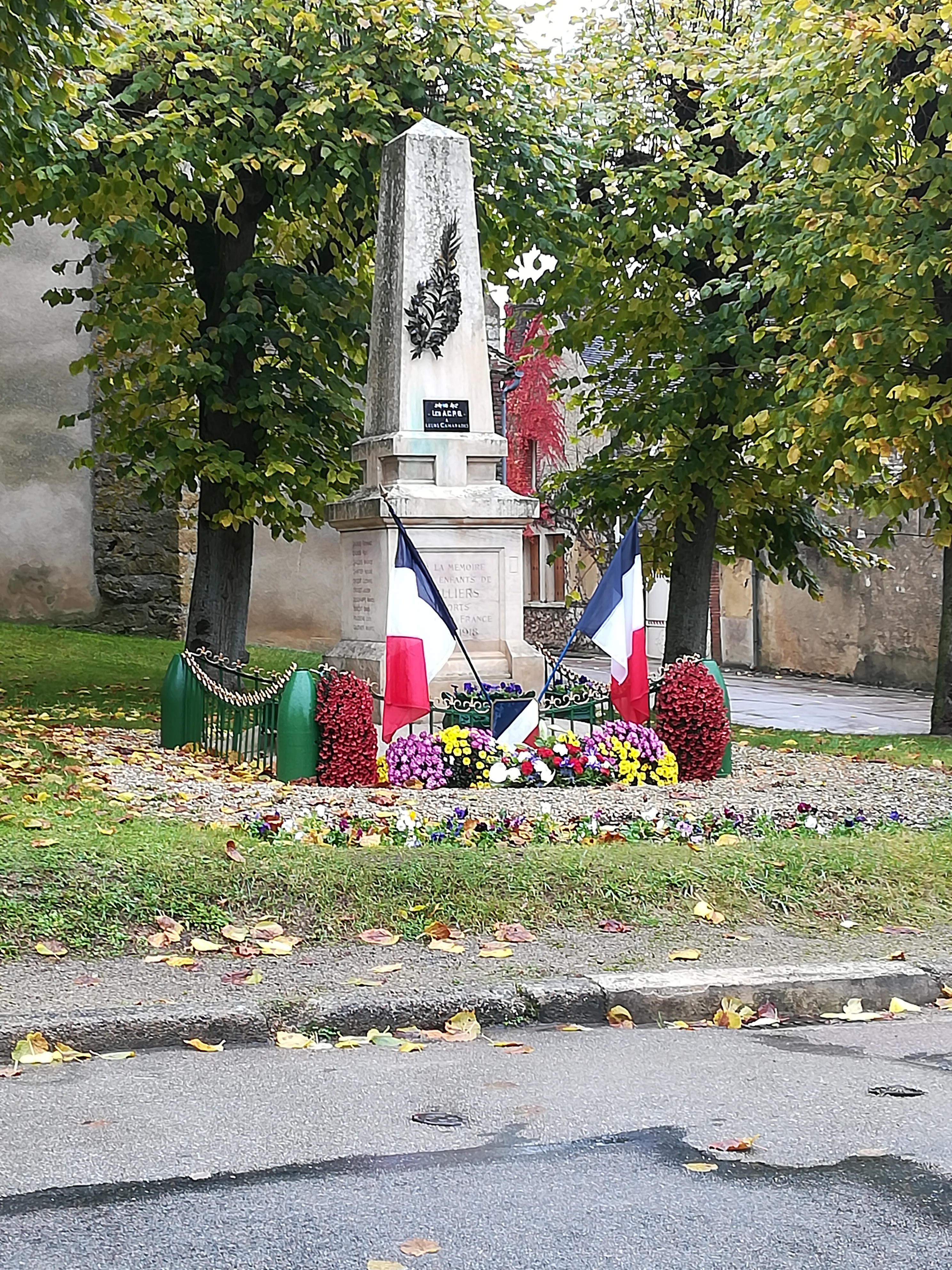 Le monument aux morts de Villiers sur tholon devant l'Eglise saint-Jean-Baptiste.